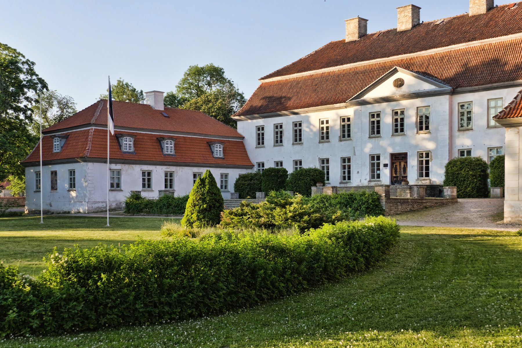 Suuremõisa härrastemaja